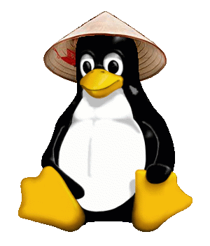 en: Tux.